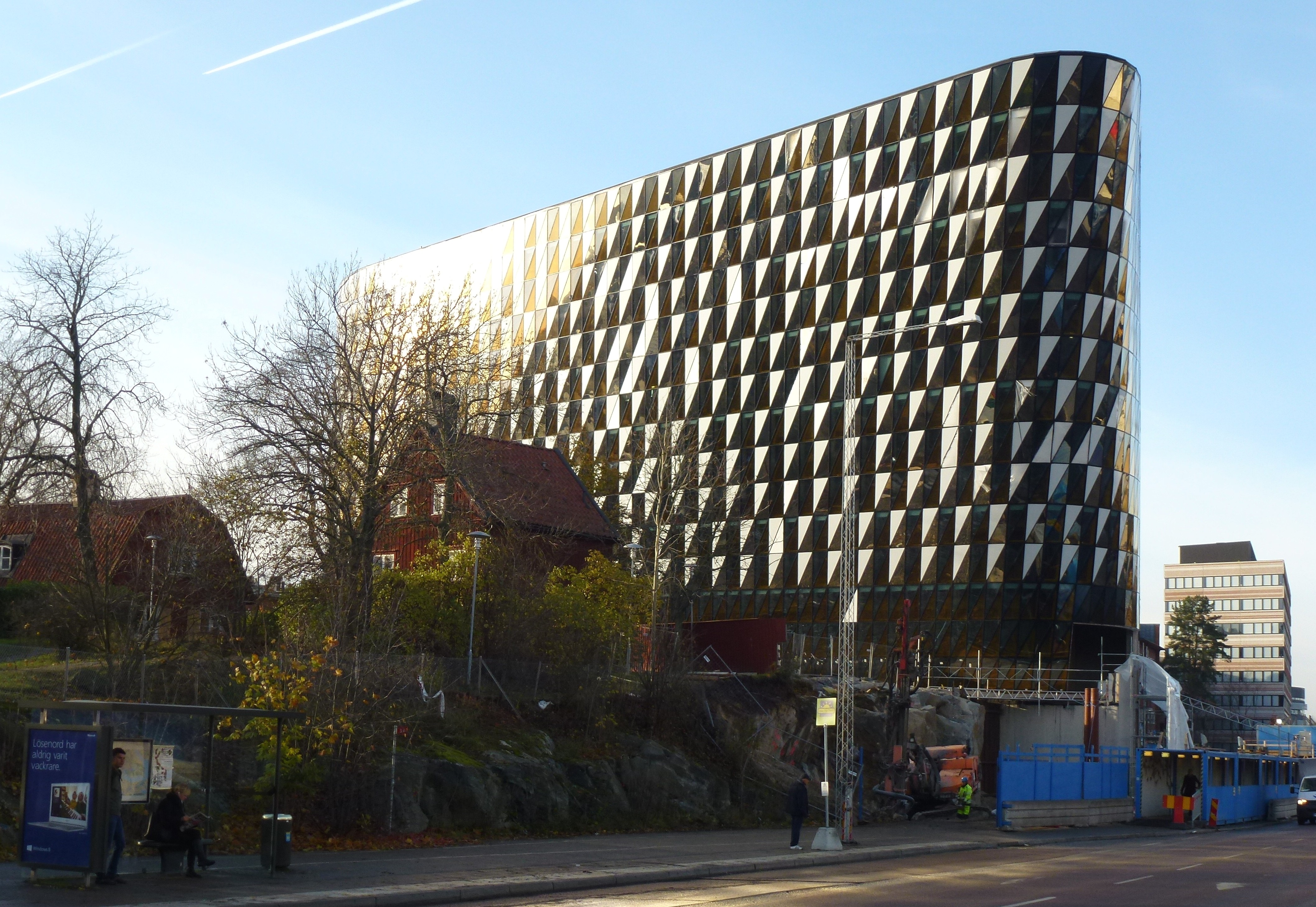 Karolinska institutes aula